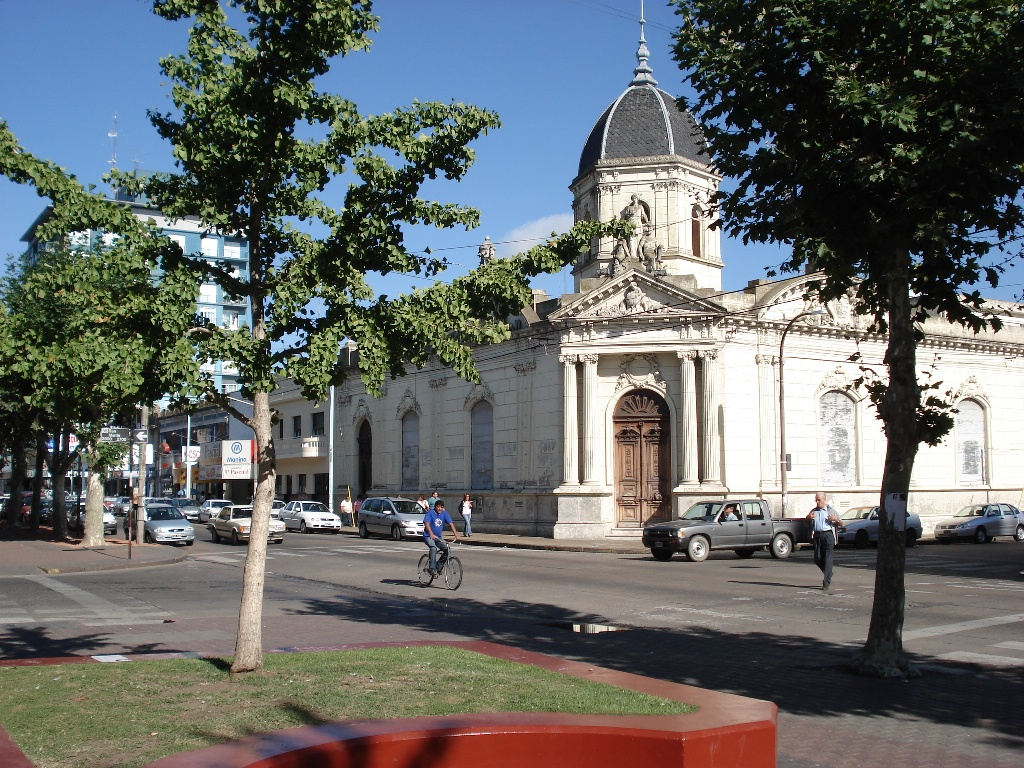 Calle céntrica en la Ciudad de Olavarría en la Provincia de Buenos Aires, Argentina.